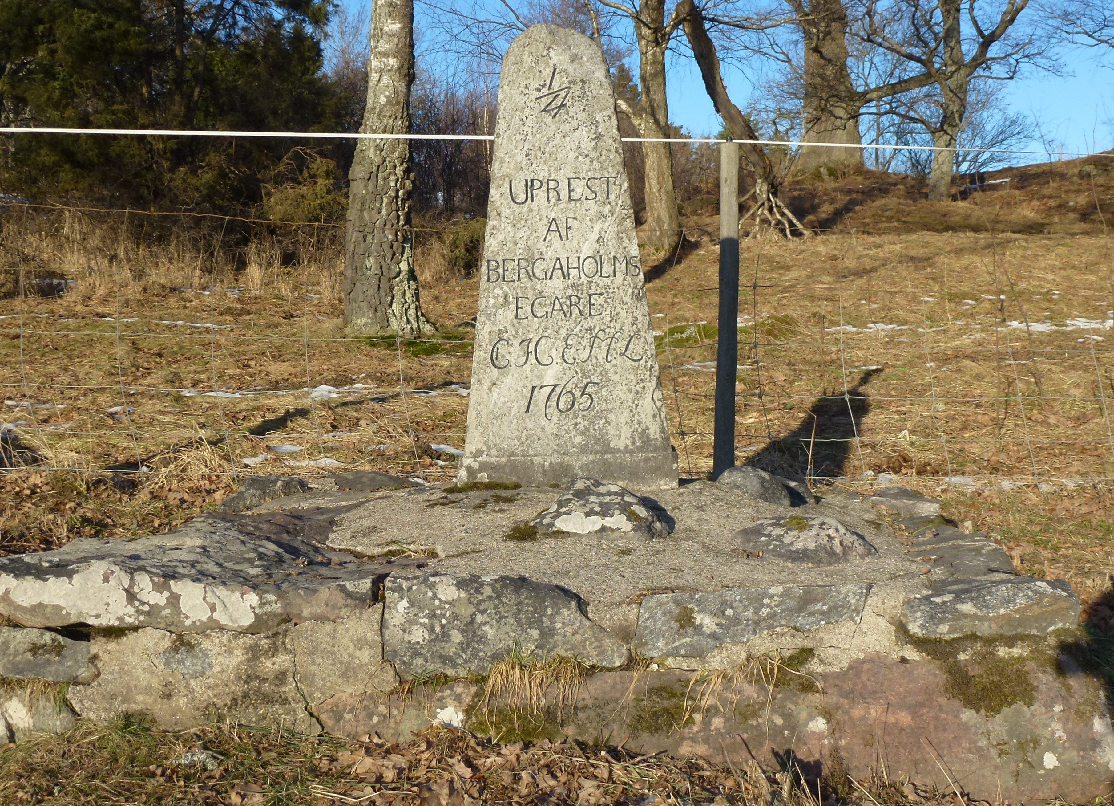 Milsten vid Bergaholms gård: C.J.C står för Carl Johan Cronstedt och E.M.L. för dennes maka Eva Margareta Lagerberg.